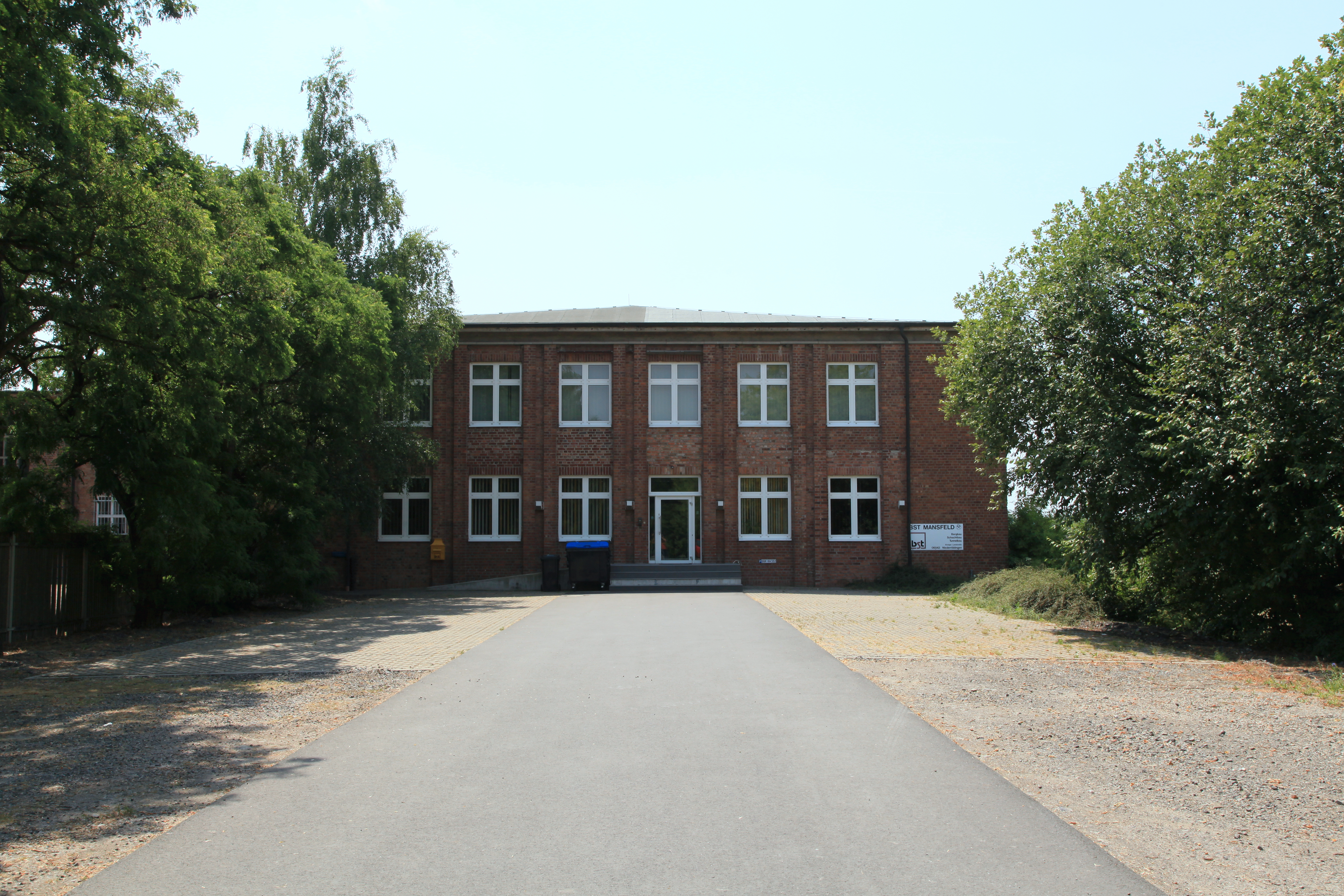 Verbliebene Gebäude der Schachtanlage Bernard Koenen Schacht Niederröblingen (Schacht 1), Einzinger Landstraße in Niederröblingen, Allstedt